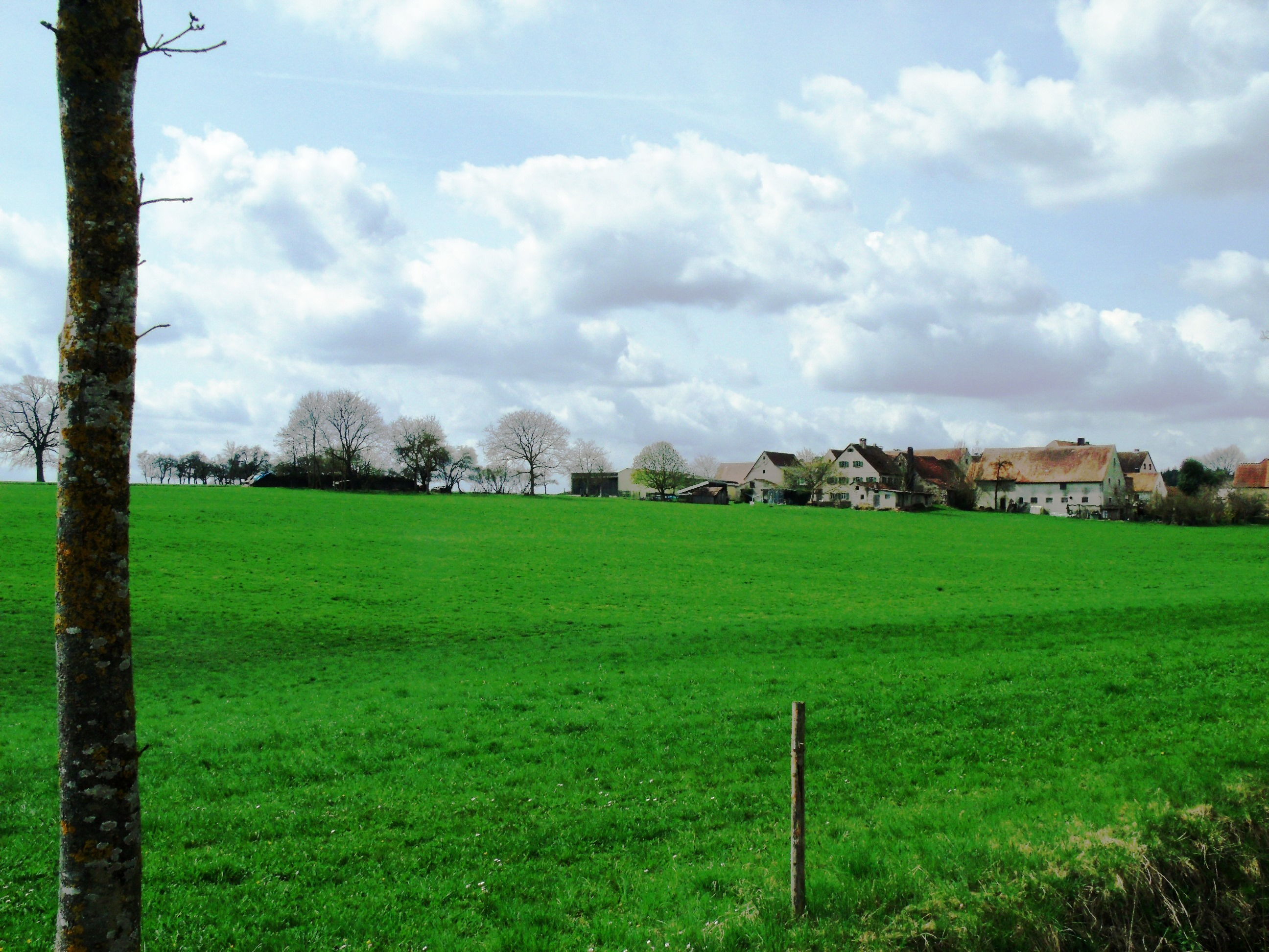 Hinterholz, Ortsteil von Leutershausen im mittelfränkischen Landkreis Ansbach